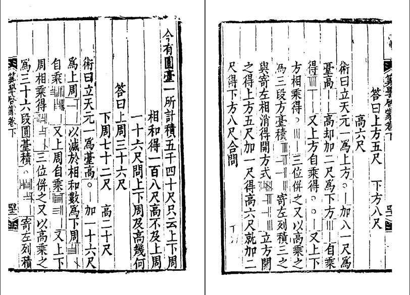 算学启蒙